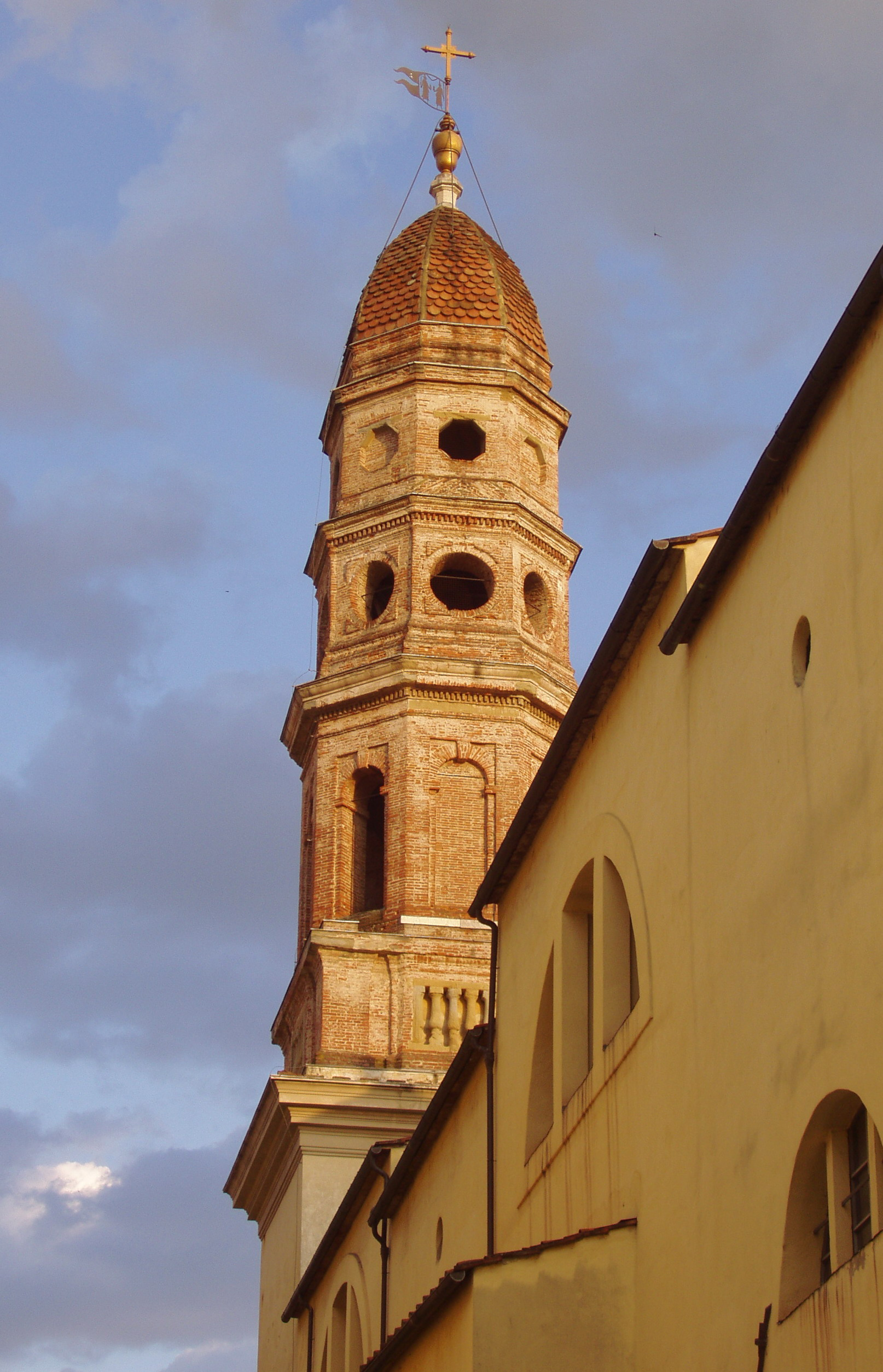 Chiesa di Santa Flora e Lucilla ad Arezzo ("La Badia"): campanile